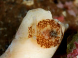 Pleurobranchaea japonica, juvenil, a 5 m, Parque Marino de Izu, Japón